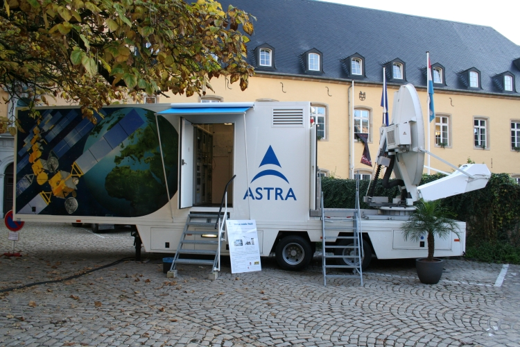 D'ASTRA Sendestatioun um Science Festival October 2005.